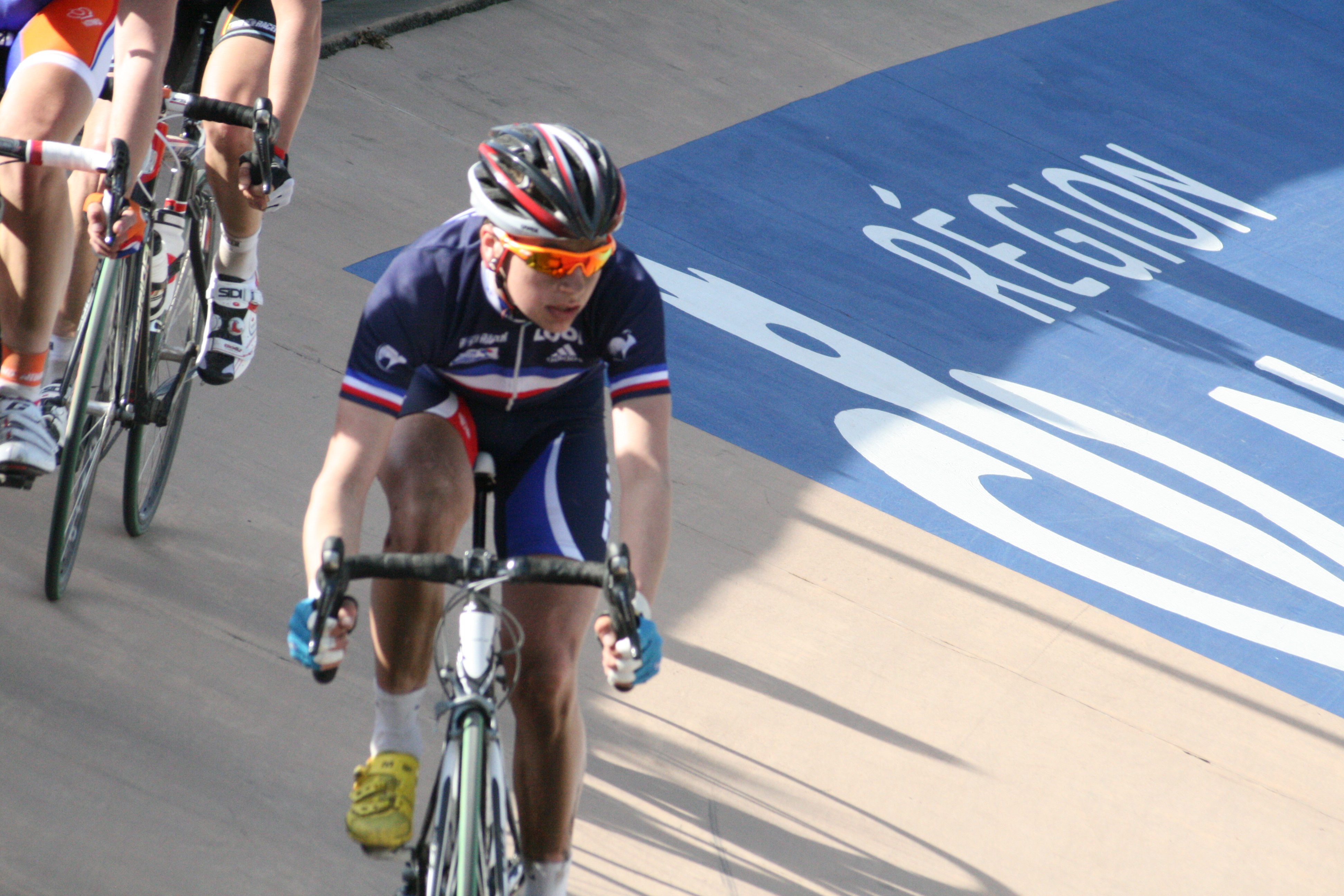 Paris-Roubaix junior 2011, vélodrome de Roubaix Alexis Gougeard à l'arrivée